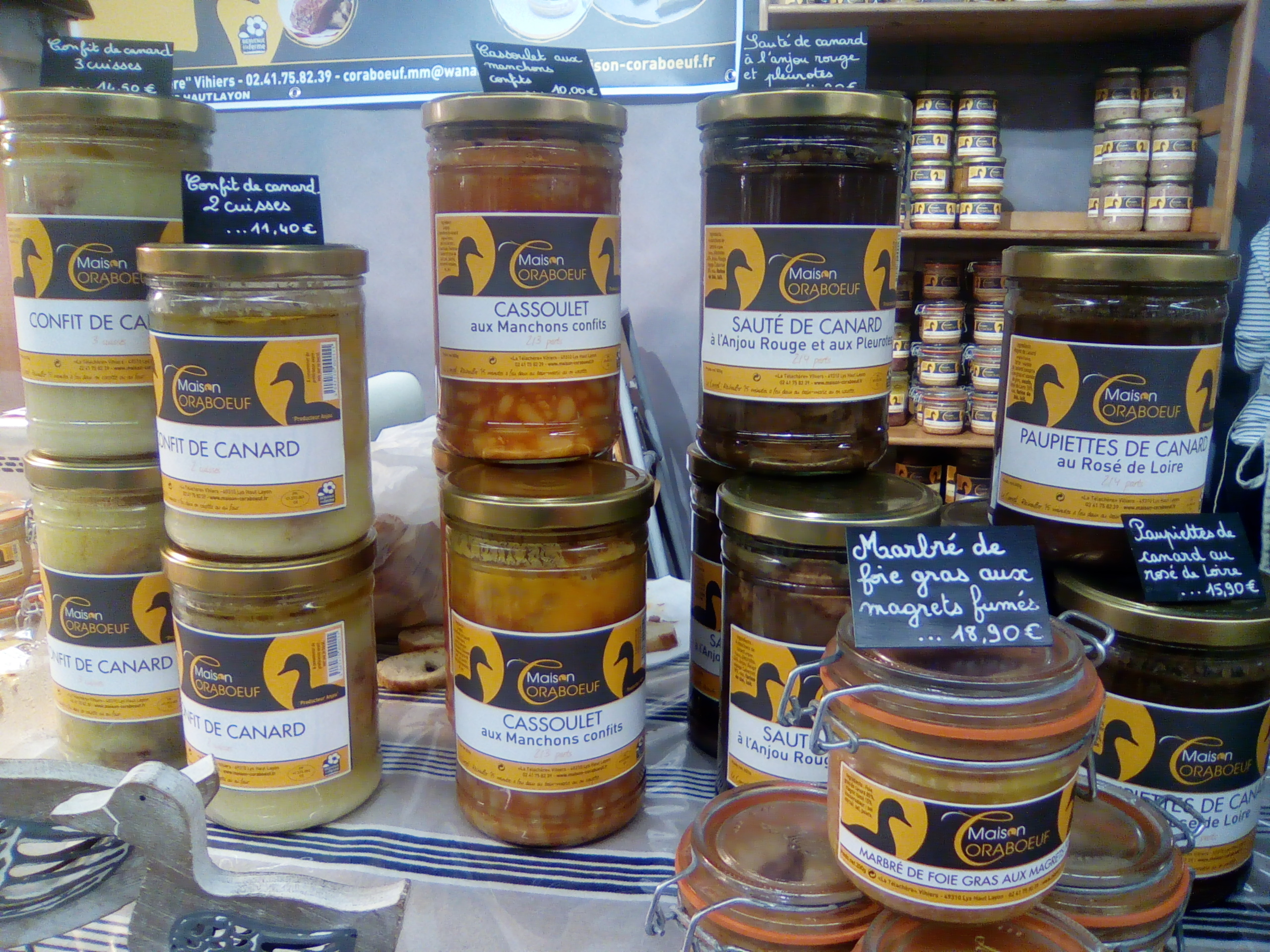 Salon "Pari fermier" à l'Espace Champerret, octobre 2017